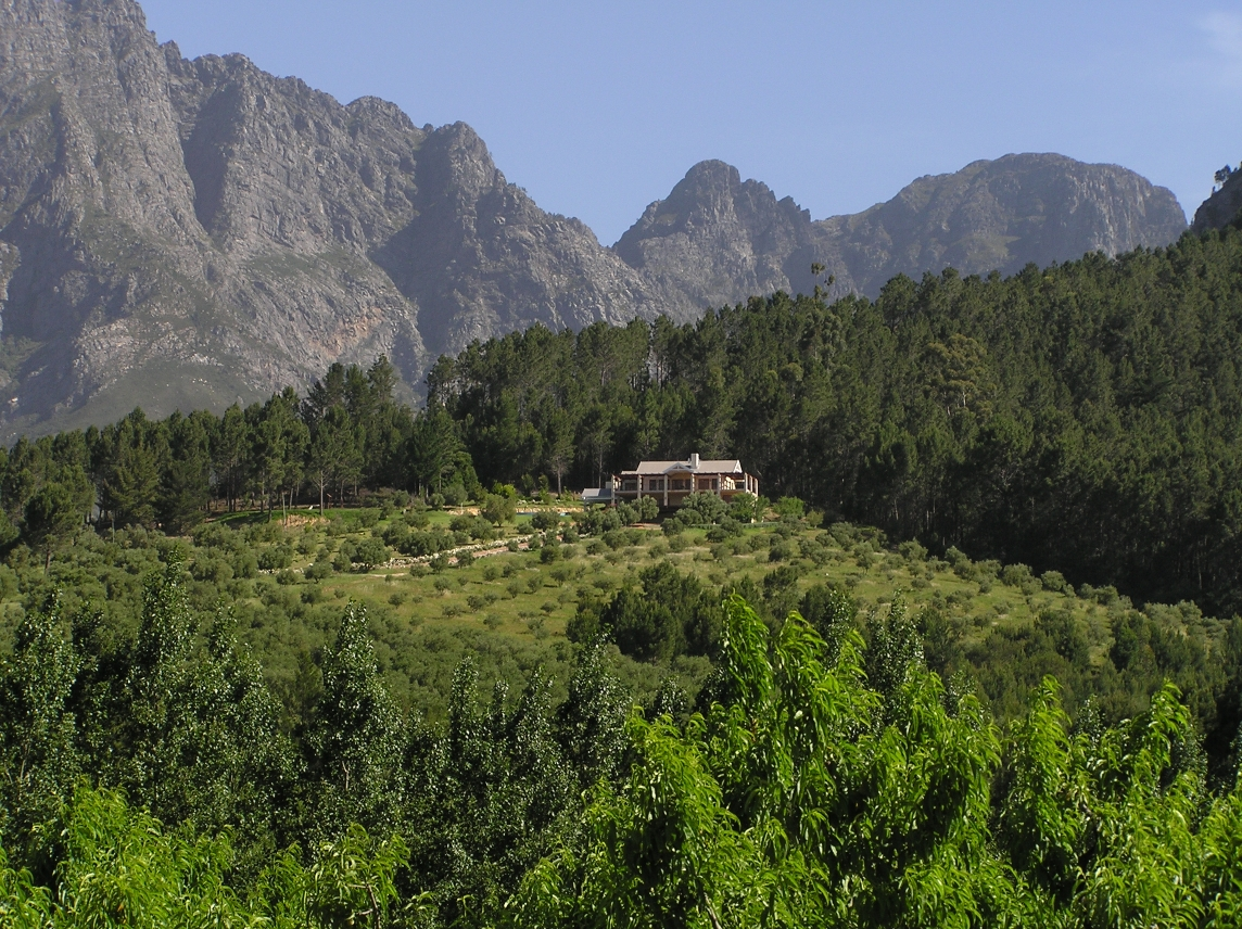 Südafrika, Franschhoek, Weingut